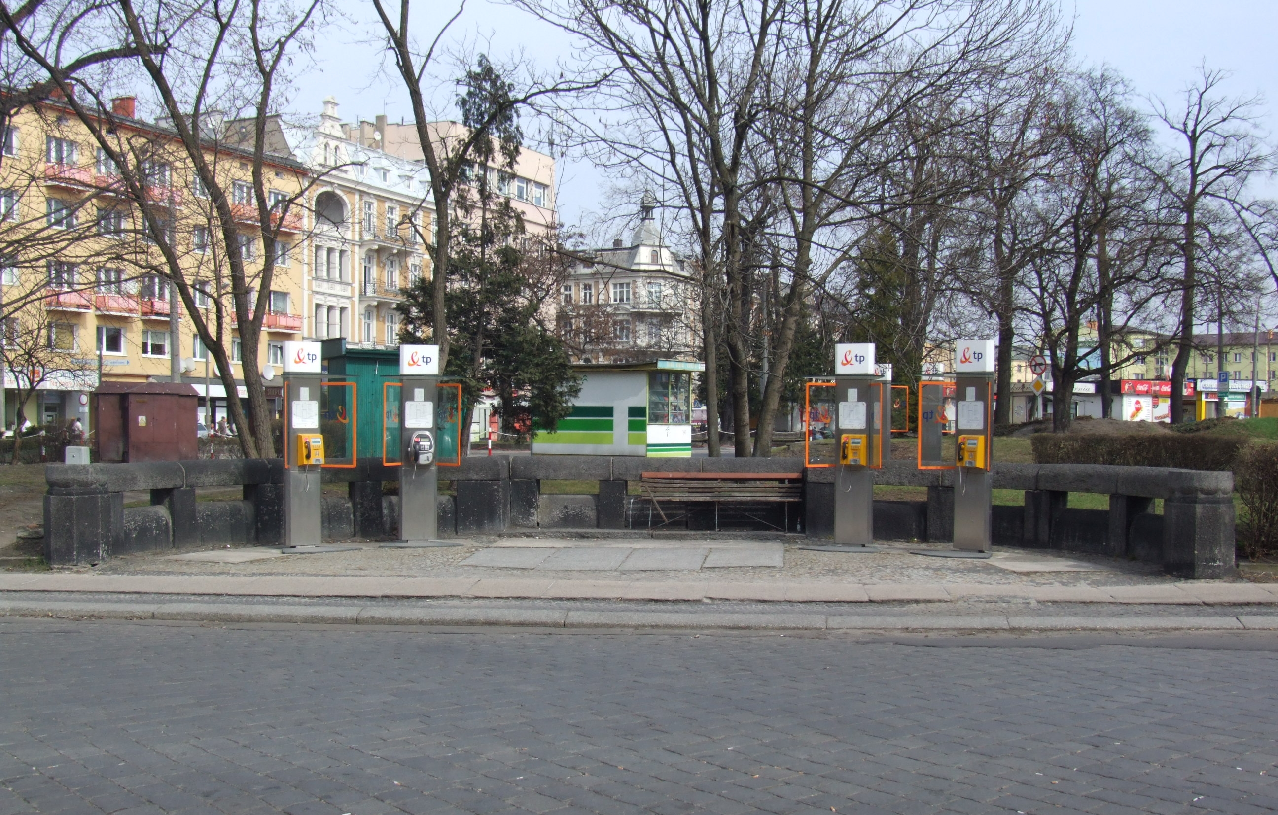 Miejsce, w którym do 1945 stał pomnik Bismarcka. Zachowała się kamienna balustrada